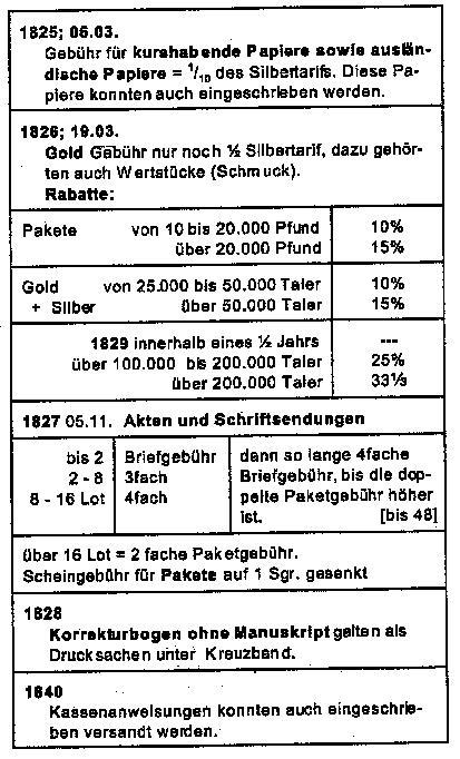 1825 Tarifänderungen